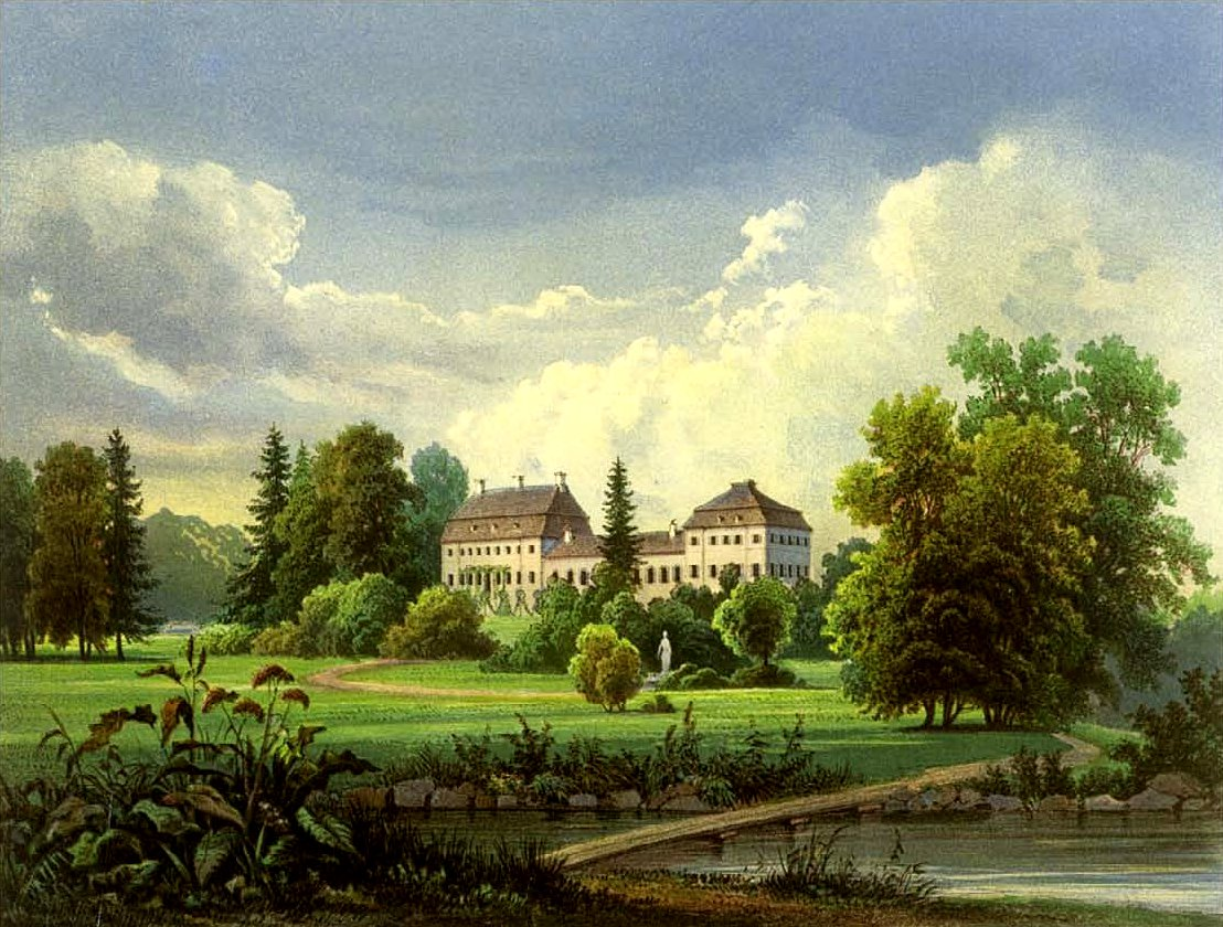 Schloss Karlsburg, Kreis Greifswald, Provinz Pommern